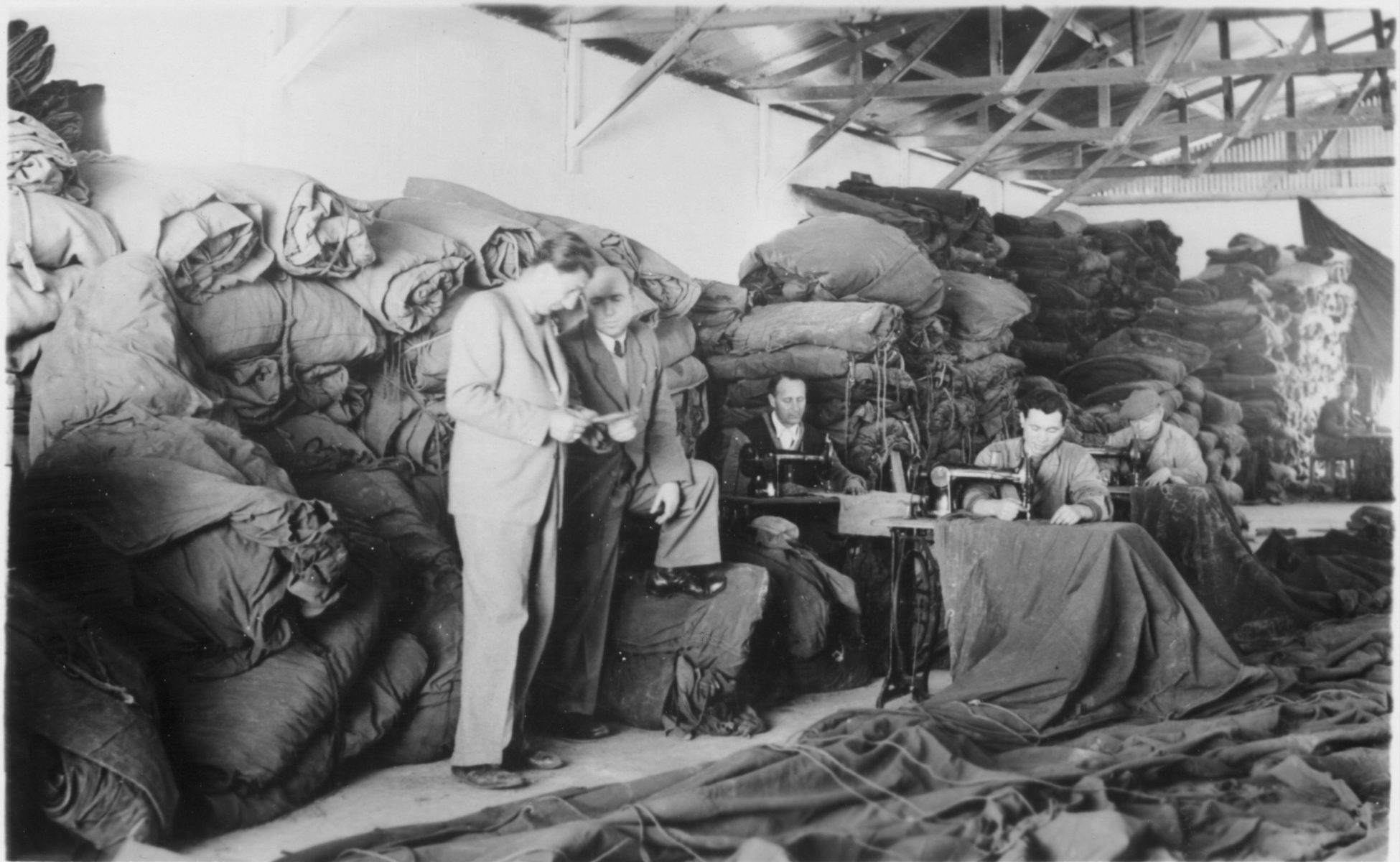 אברהם זכאי מארח ביקור של שאול אביגור ויהודה ארזי במחנה א של המוסד לעליה ב' במג'נטה